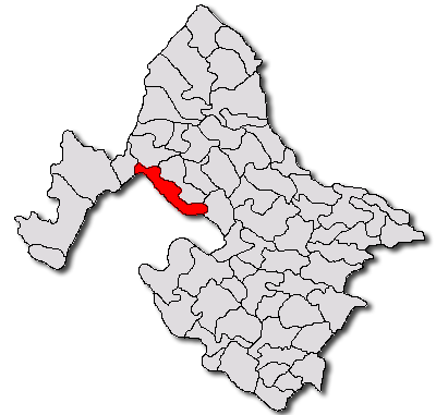 Categorie:Hărţi ale judeţului Mehedinţi